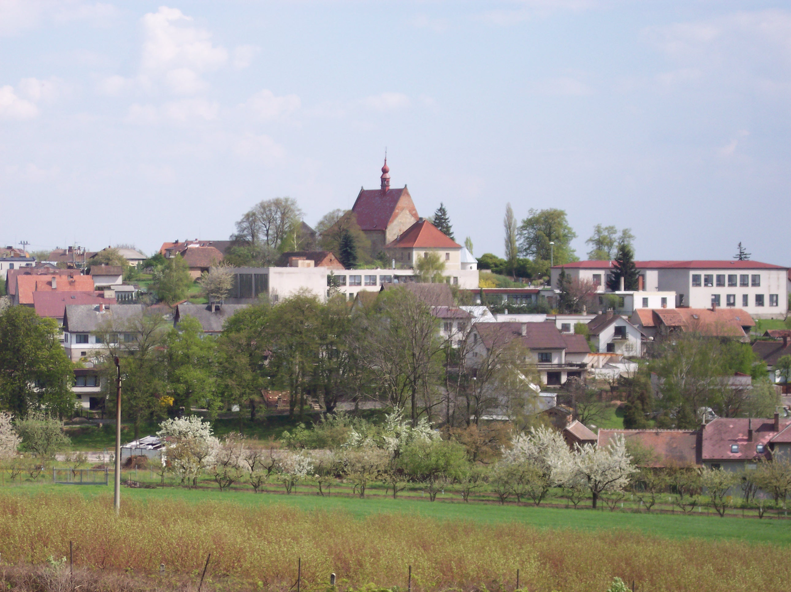 Moje fotka